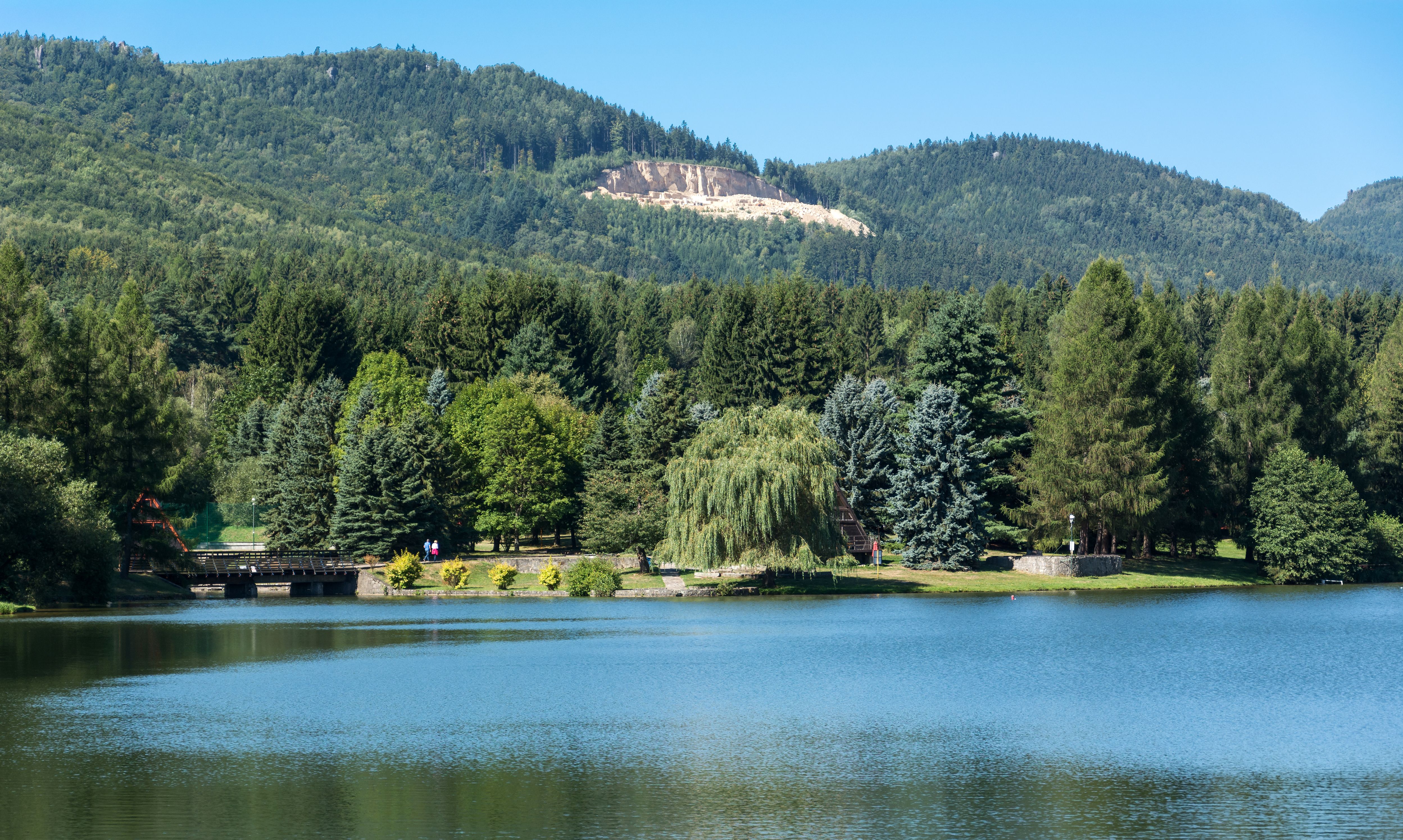 Otulina Parku Narodowego Gór Stołowych - zalew w Radkowie This is a photography of protected area with CRFOP ID PL.ZIPOP.1393.PN.15